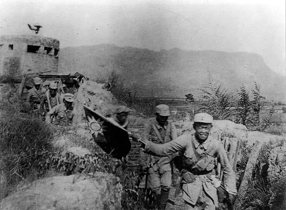 来自新华网《军事天地》 照片拍摄的中国抗日战争时期八路军攻占娘子关的场景。摄于1940年。 来源：延安《新中华报》 发布日期：1940年8月25日